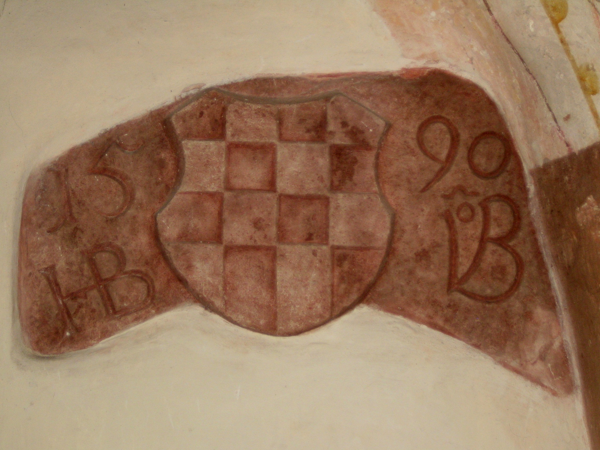 Detail St. Vinzenz Liel mit Wappen des Hans Balthasar von Baden